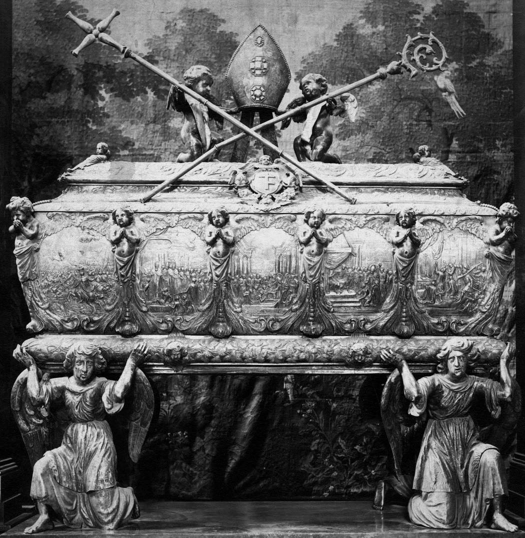 Photograph (detail)